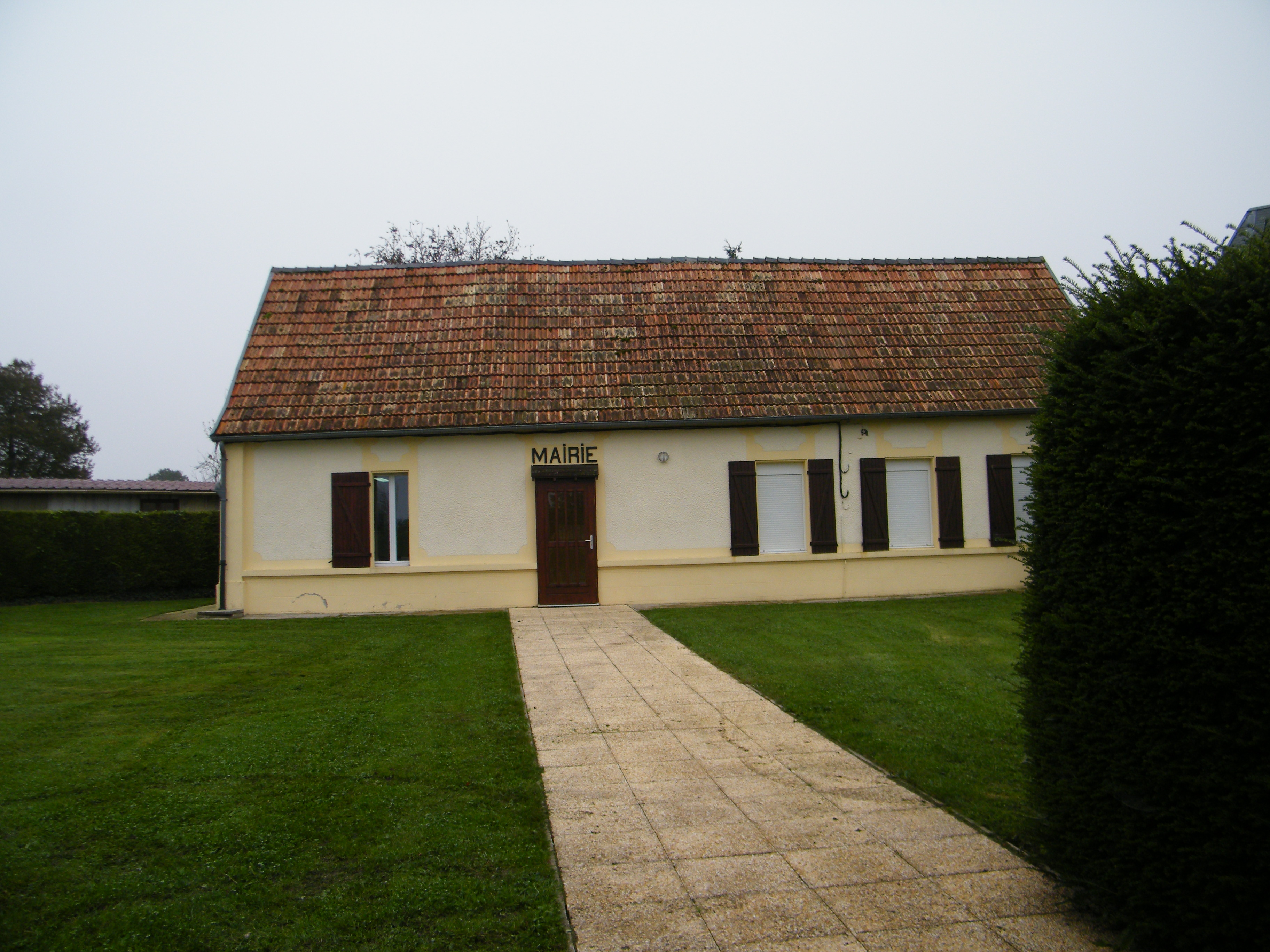 Mairie.